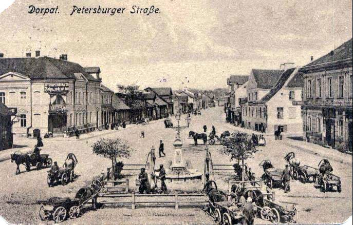 Henningi plats Tartus 1890. aasta postkaardil